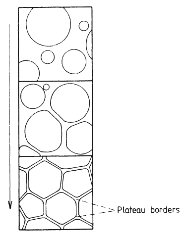 Putu veidošanās